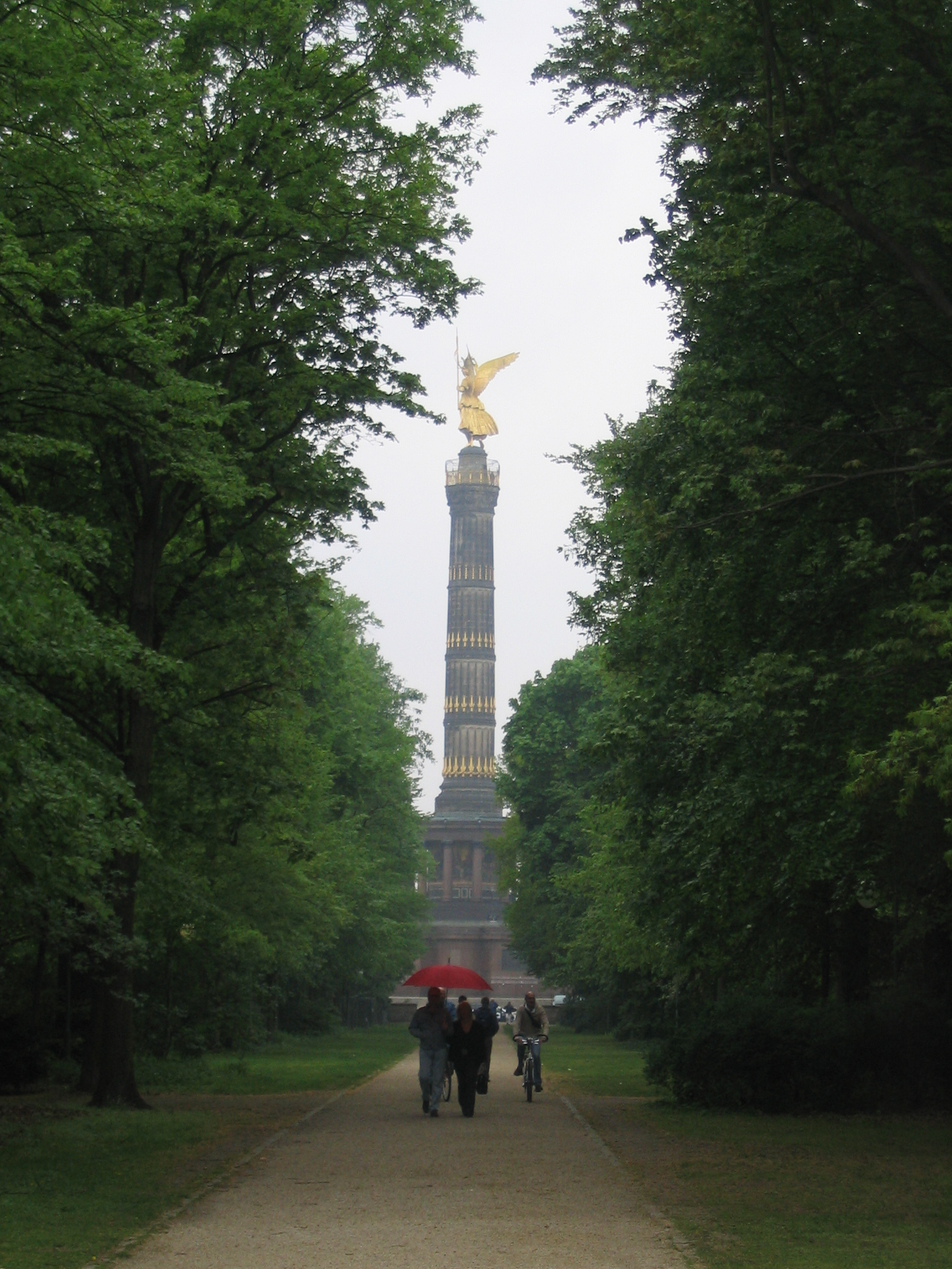 Siegessäule in Tiergarten, Berlijn. Eigen werk.